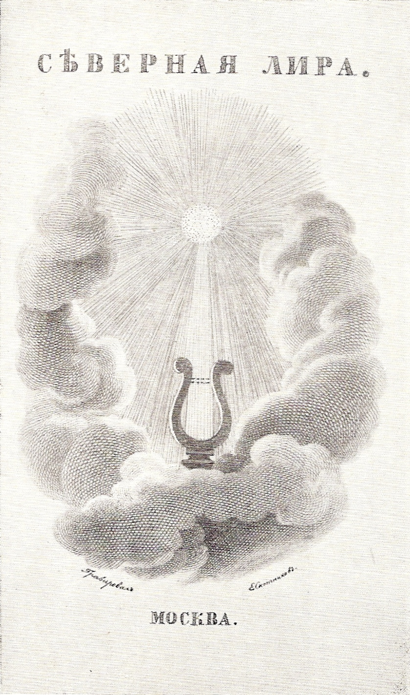 Обложка альманаха "Северная лира" на 1827 год. Издан С. Е. Раичем и Д. П. Ознобишиным. Гравёр Е. Скотников.